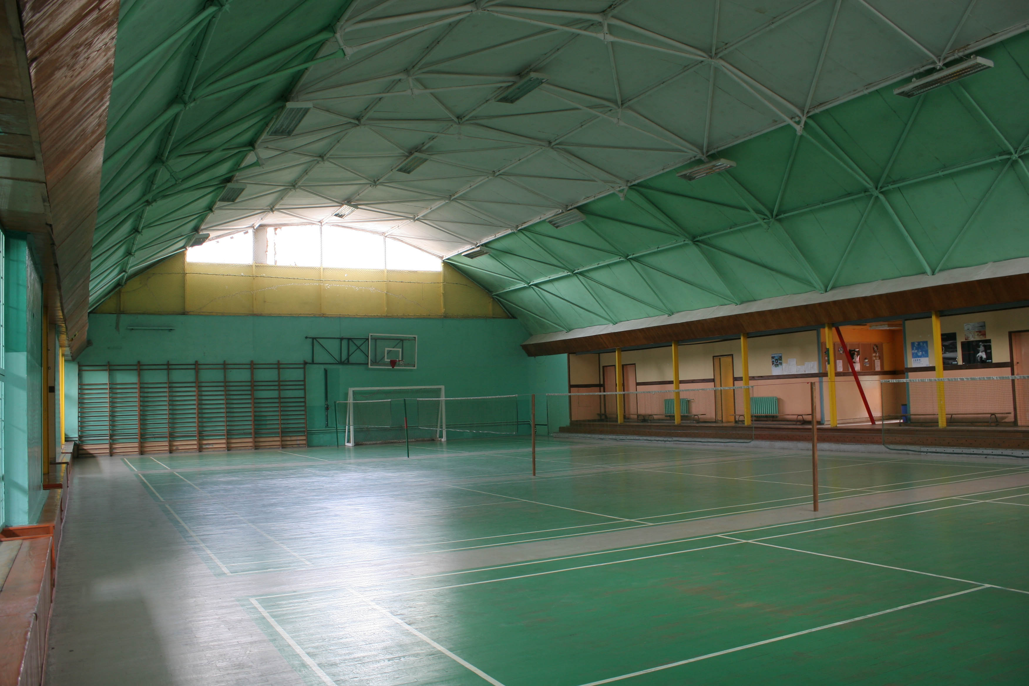 Wnętrze hali Kolejowego Klubu Sportowego Warmia w Olsztynie